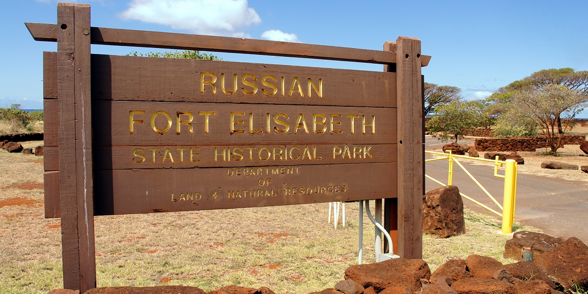 Иллюстрация для викиучебника Гавайеведение